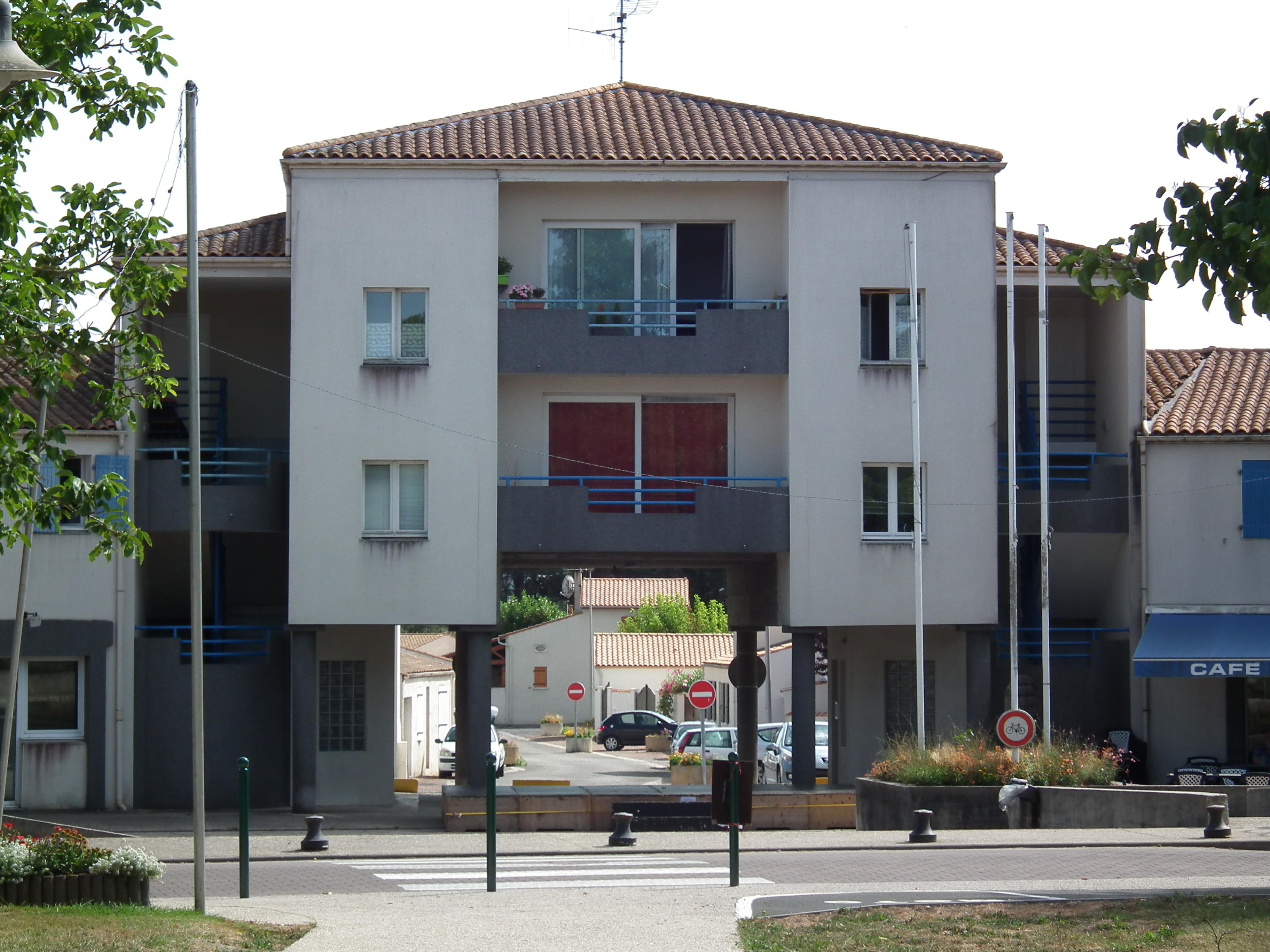 Immeuble de la place des Vieilles Forges à Saint-Sulpice-de-Royan